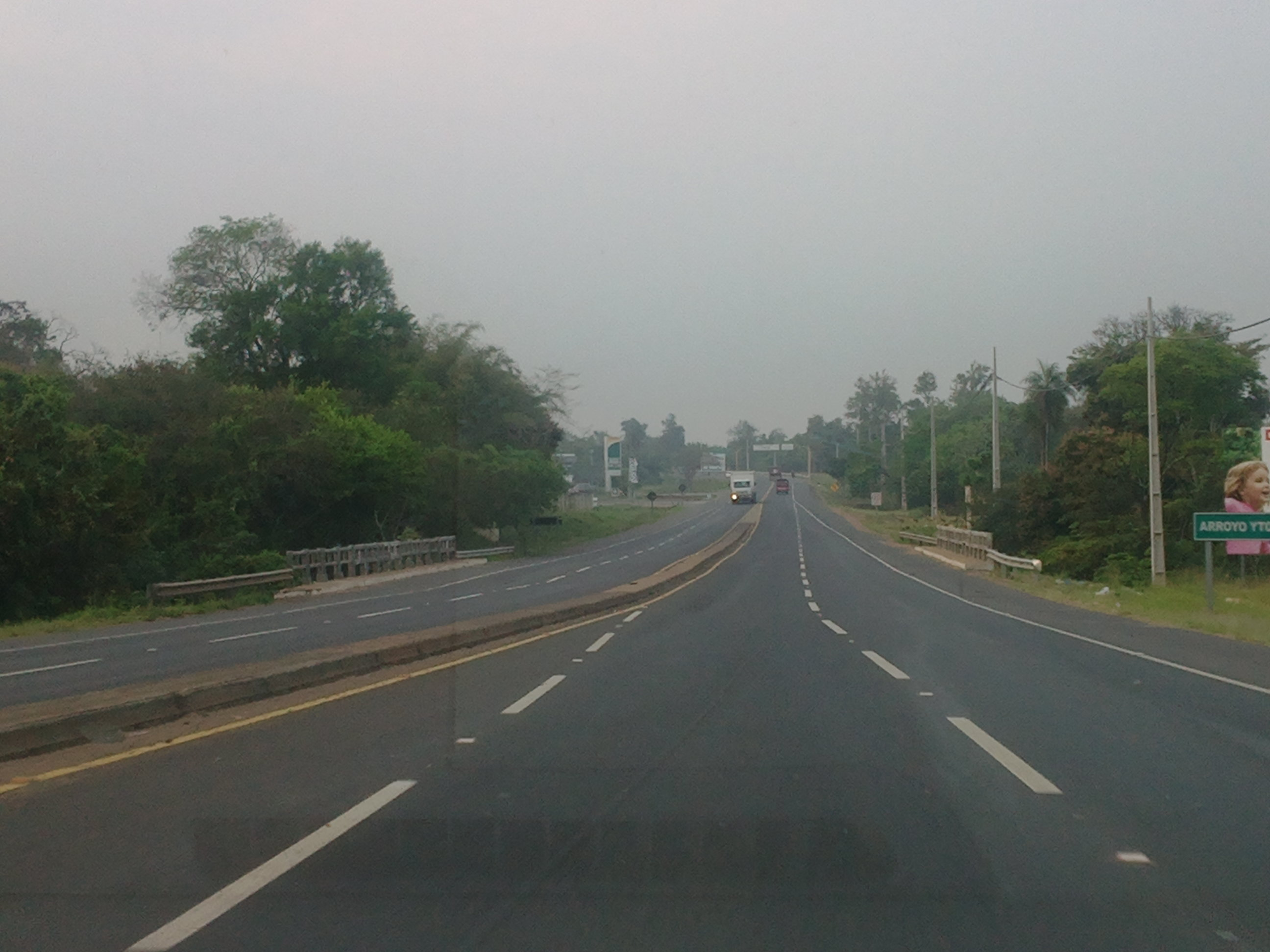 Avenida Acceso Sur, Paraguay